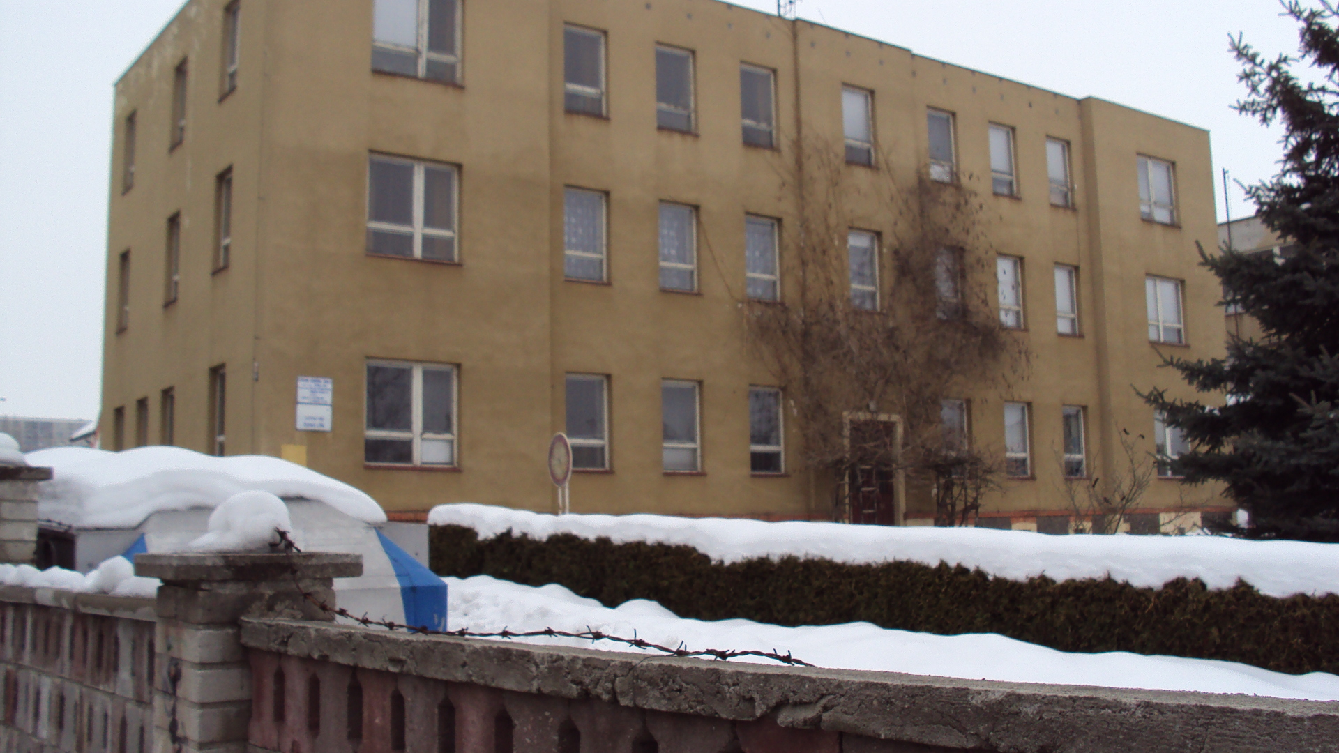 Česky: Střední odborná škola Lužická